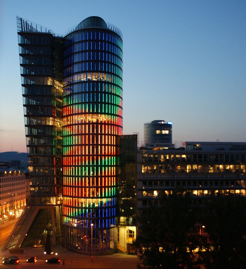 UNIQA Tower in Wien. Lichtinstallation durch Licht Kunst Licht, seit 2005.